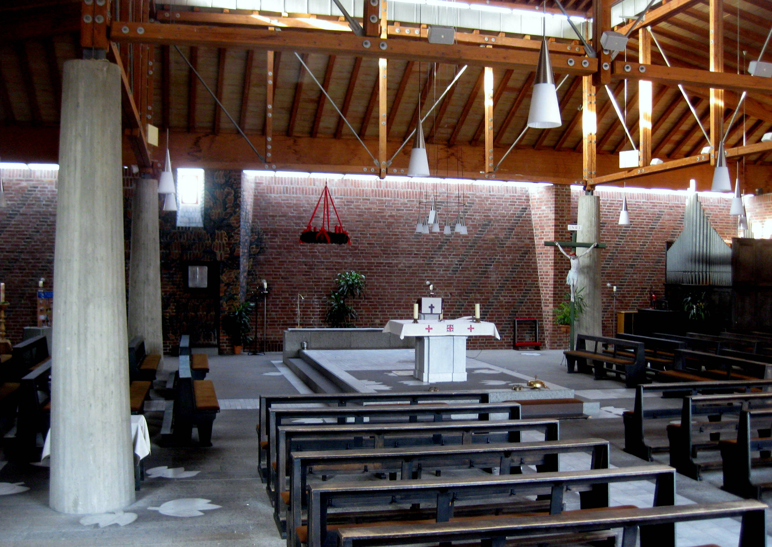 Katholisches Gemeindezentrum im Erzbistum Paderborn, 1974